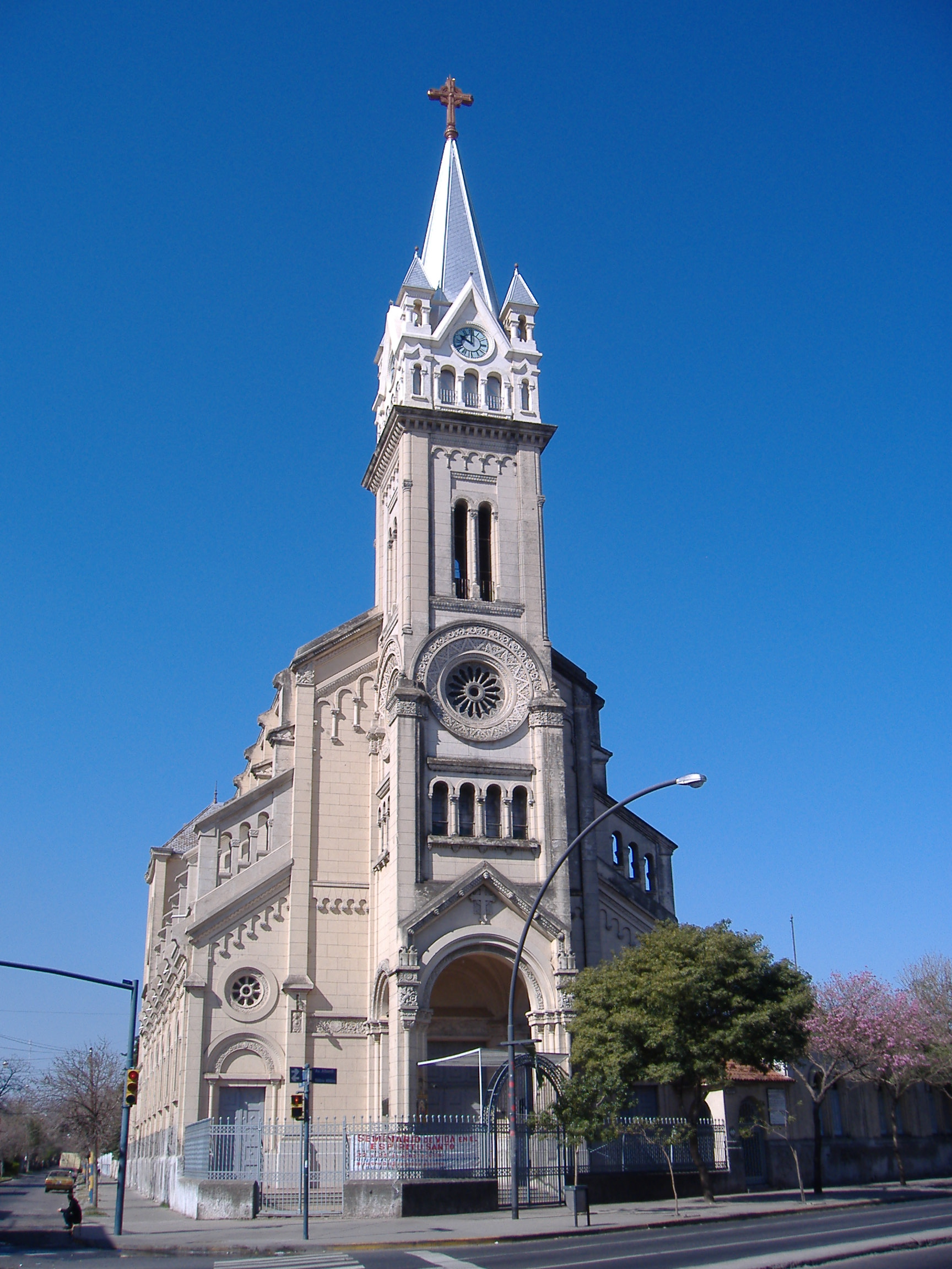 Parroquia del Perpetuo Socorro, a church in Alberdi Ave. and French St., Rosario, Argentina.